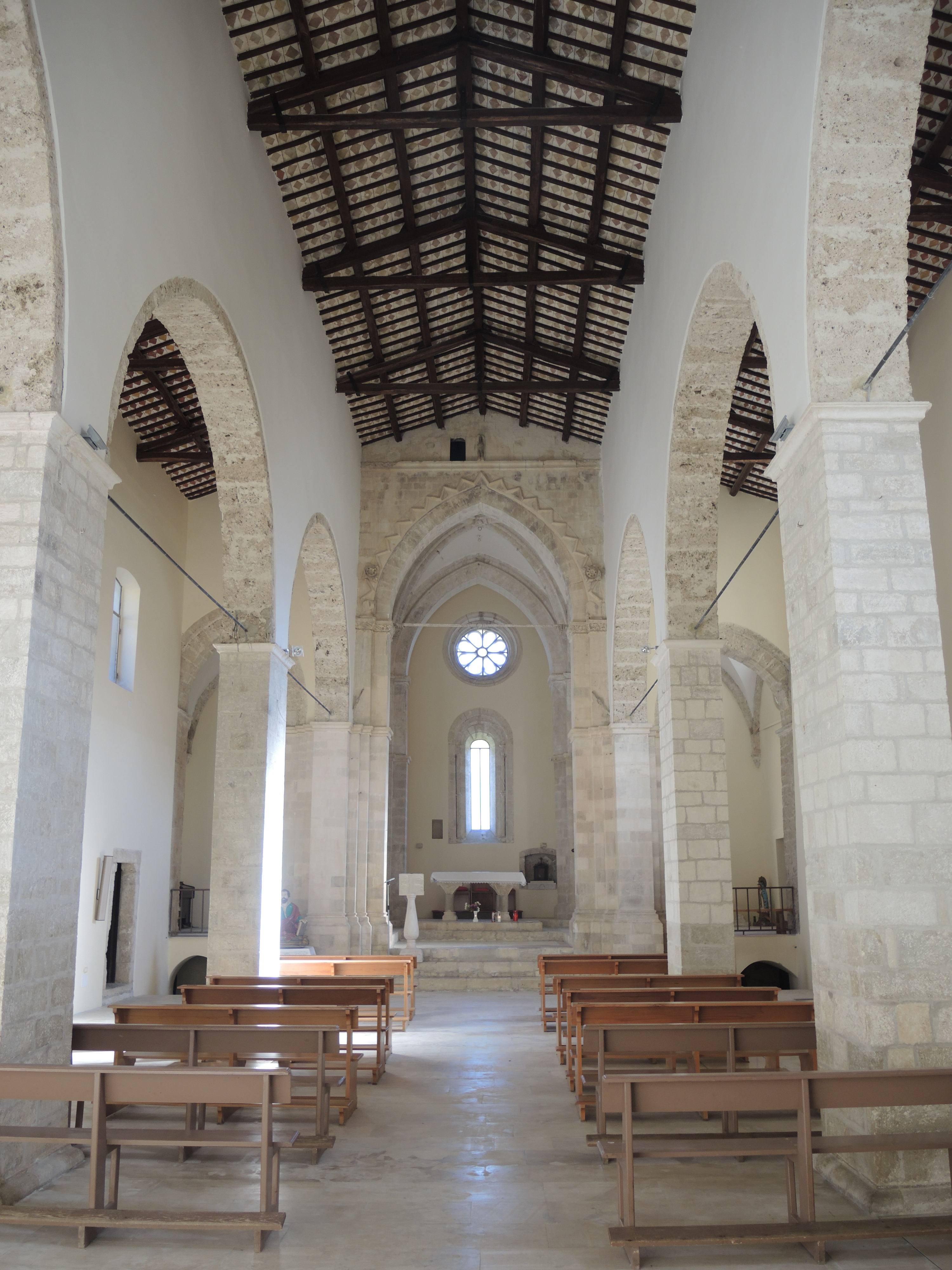 Abbazia di San Bartolomeo a Carpineto della Nora (PE)